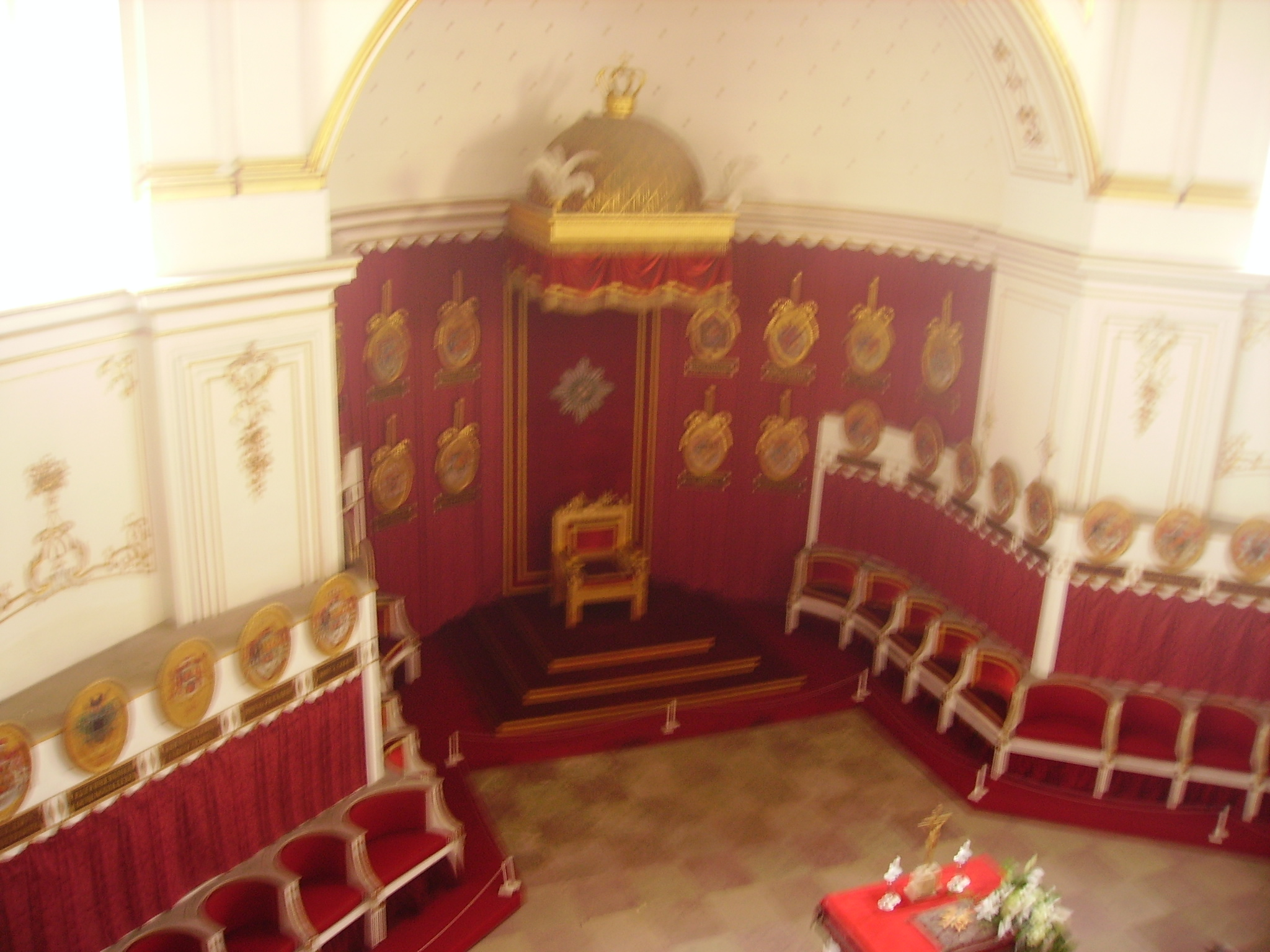 Ordenskapelle des Schlosses Ludwigsburg, Ludwigsburg Unknown